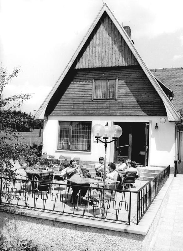 Ferienobjekt für LPG-Bauern ADN-ZB Deutsche Demoraktische Republik Intensive Landwirtschaftliche Produktion Urlaub in Thüringen 15-81 Ein Ferienobjekt der LPG "Oriental" in der Nähe der Hohenwartetalsperre. Es entstand in Kooperation zwischen der LPG Pflanzenproduktion "Oriental" und der LPG Tierproduktion und umfaßt 20 moderne Bungalows, ein Ferienheim und eine Gaststätte (Bild). In der landwirtschaftlich reizvollen Gegend haben die Urlauber viele Möglichkeiten der Erholung und Entspannung wie das Wandern durch die Wälder, baden an der Talsperre, Fahrten mit dem Schiff der "Weißen Fiotte"" und Reiten auf Pferden, die die Genossenschaft zur Verfügung gestellt hat. Reporter: Link Copyright: ADN-Zentralbild